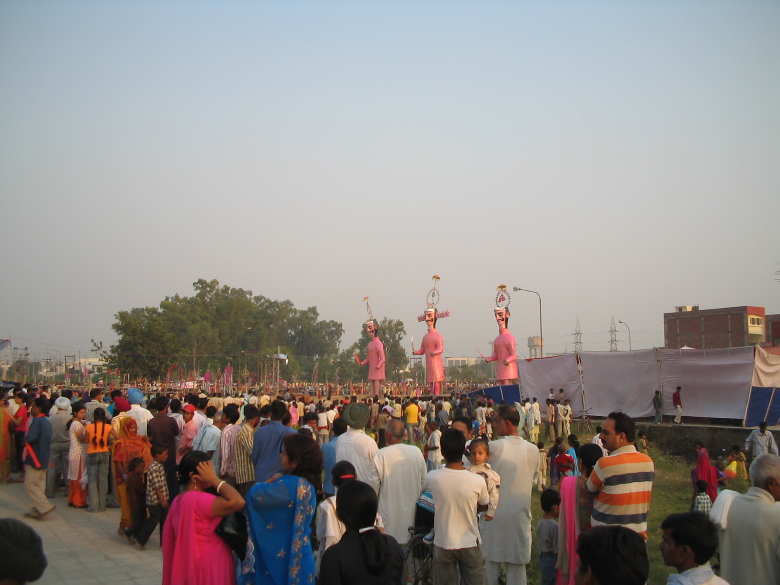 Dussehra (Vijayadashami) celebrations -- Shot here in Jalandhar, Punjab, India